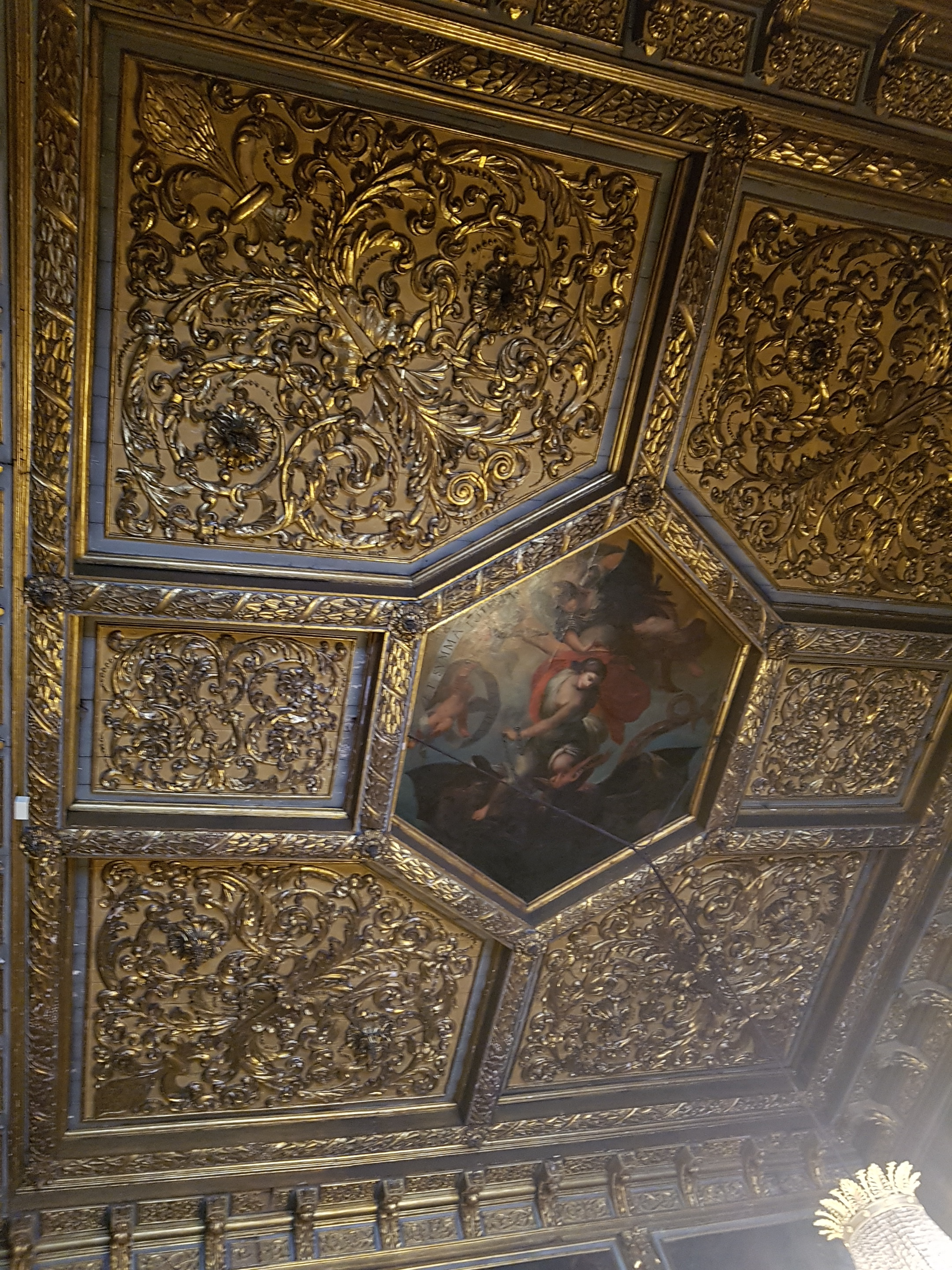 Piano nobile: Tetto Sala degli Staffieri, Palazzo Reale, Torino